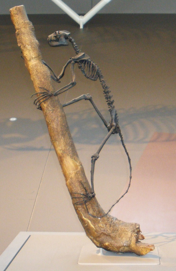 Fossil of Notharctus, an extinct primate Took the photo at Musee d'Histoire Naturelle, Brussels